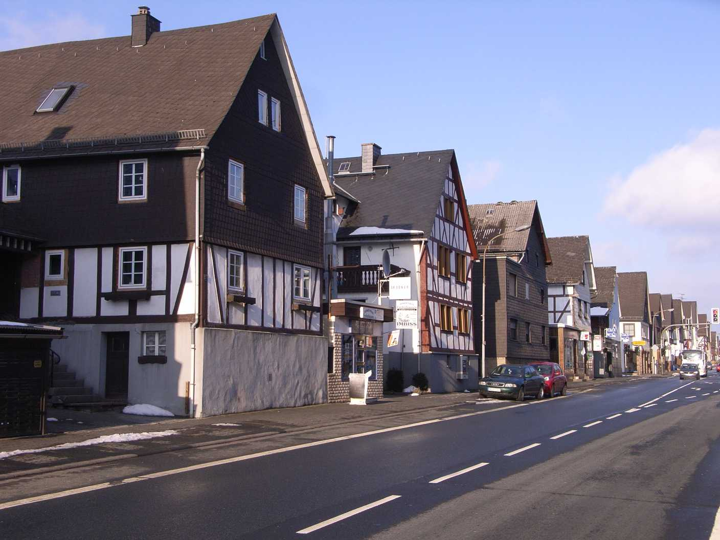 Fronhausen (Dillenburg, Hessen)